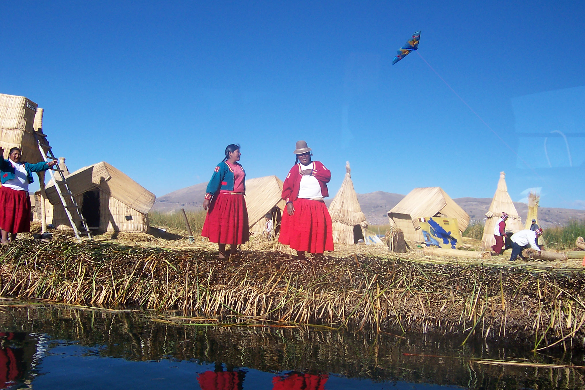 Isla flotante de los Uros en el Lago Titicaca. Autor: Alfredobi Fecha: Agosto 2006